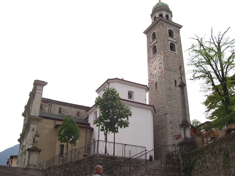 Lugano - Cattedrale